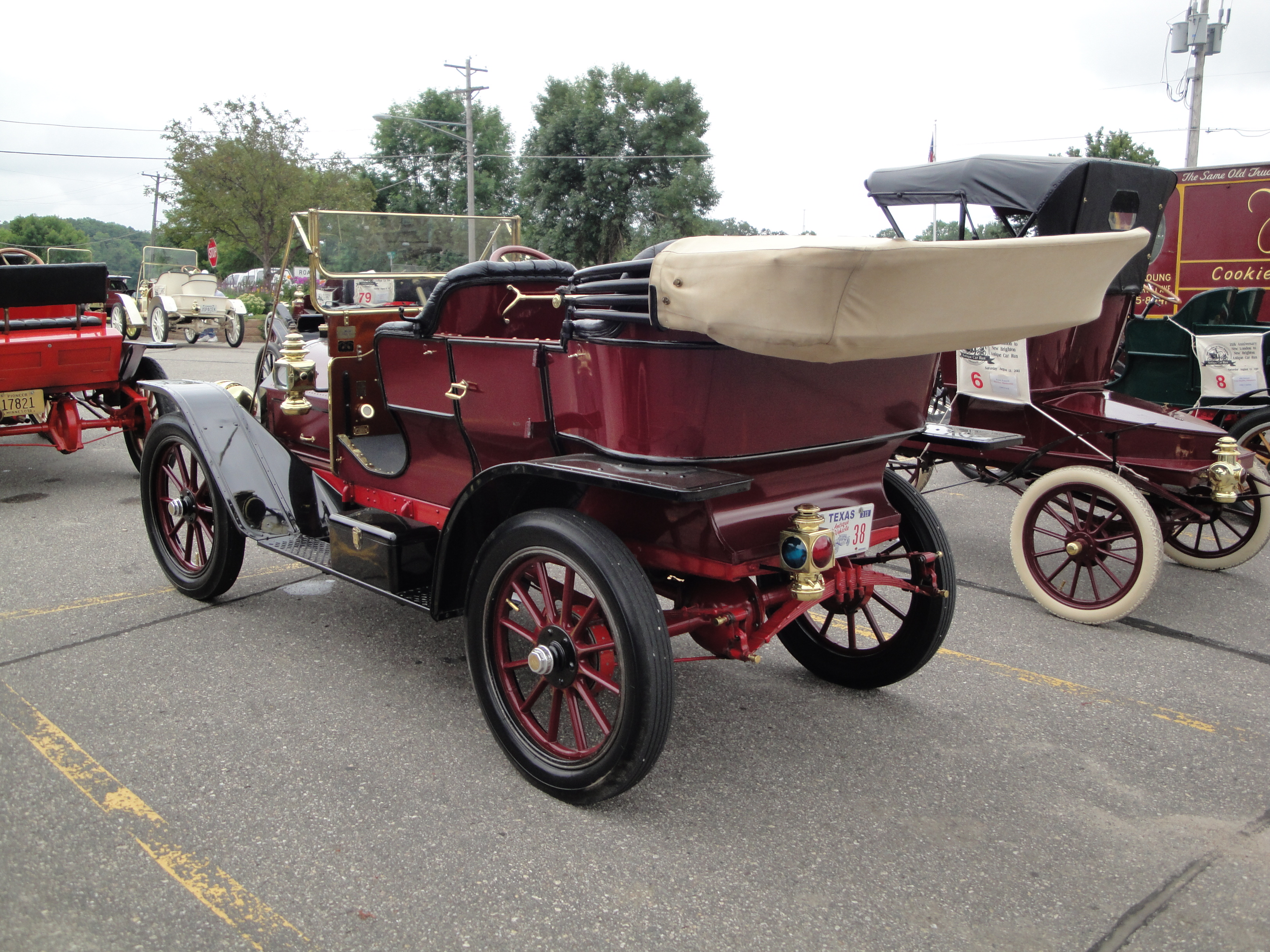 1908 Cadillac Model 30 Touring